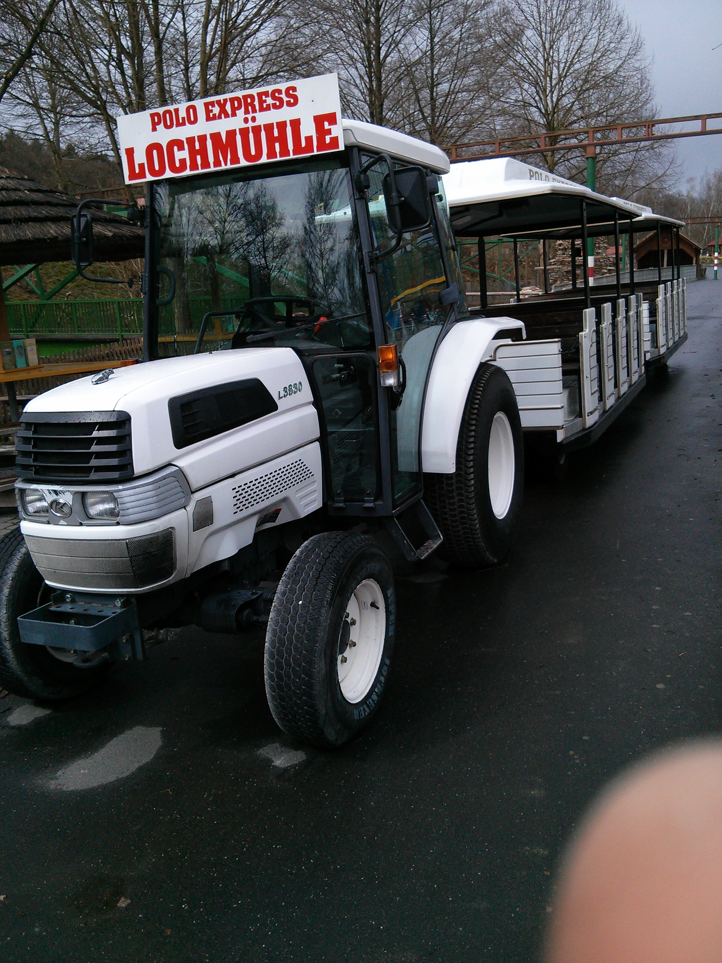 Lochmühle